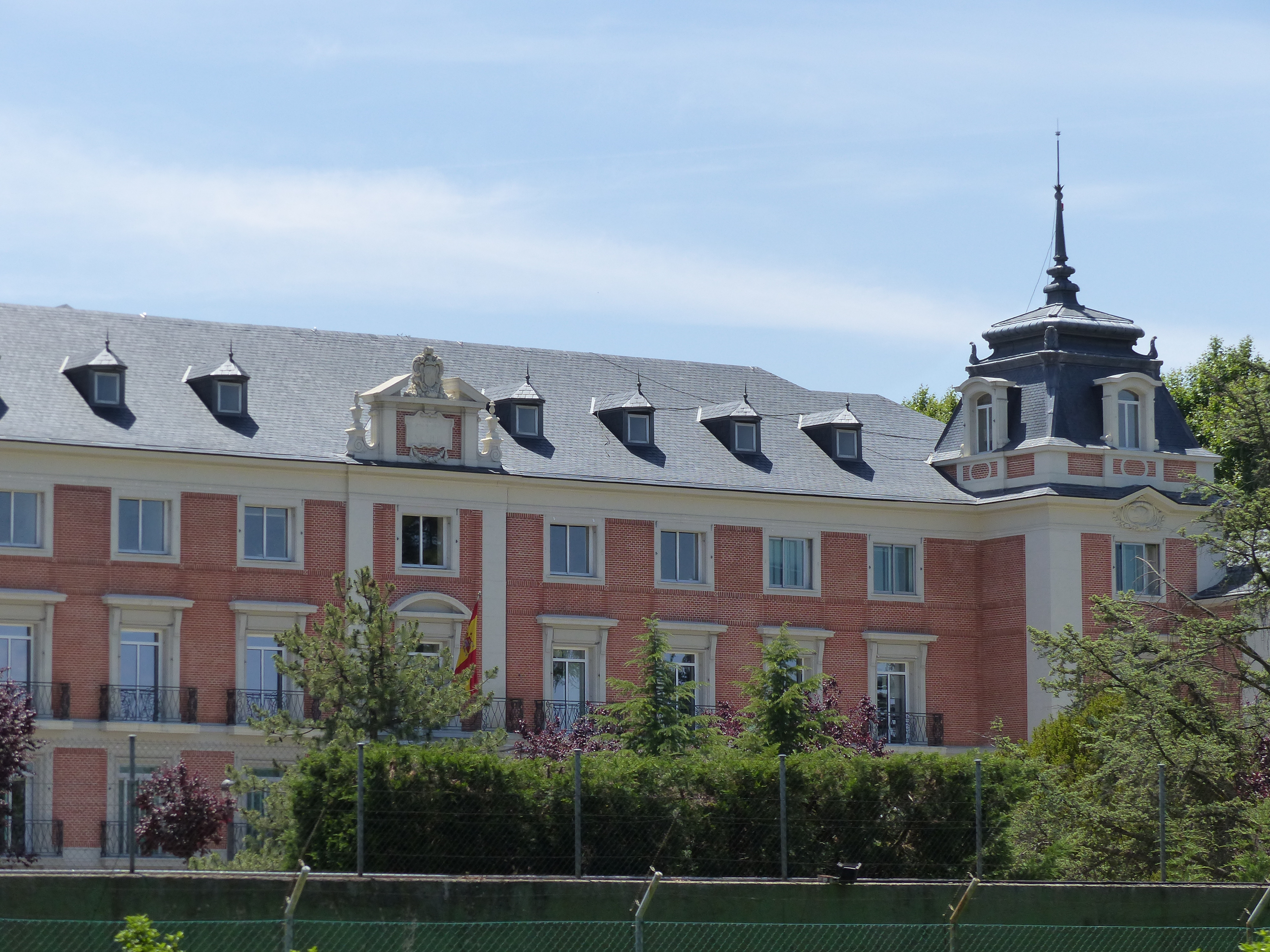 La Moncloa desde la carretera